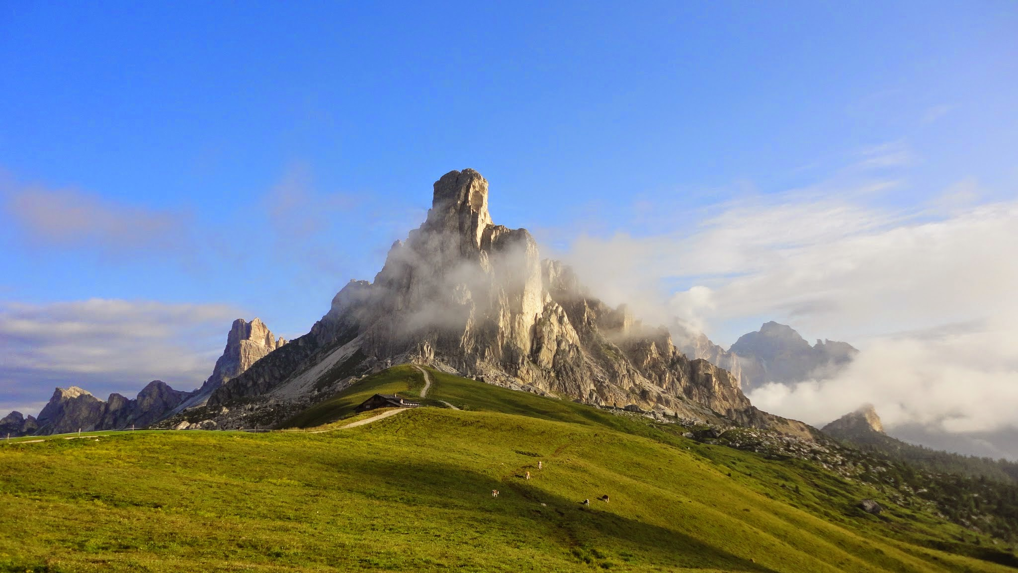 La Gusela del Nuvolau vista dal passo Giau